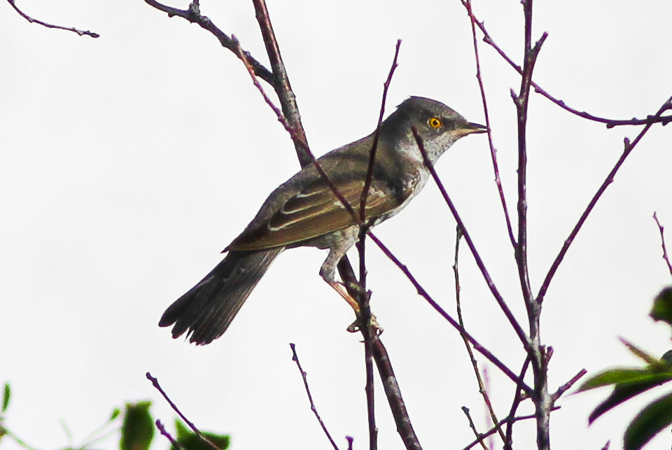 Kurgaldzhin